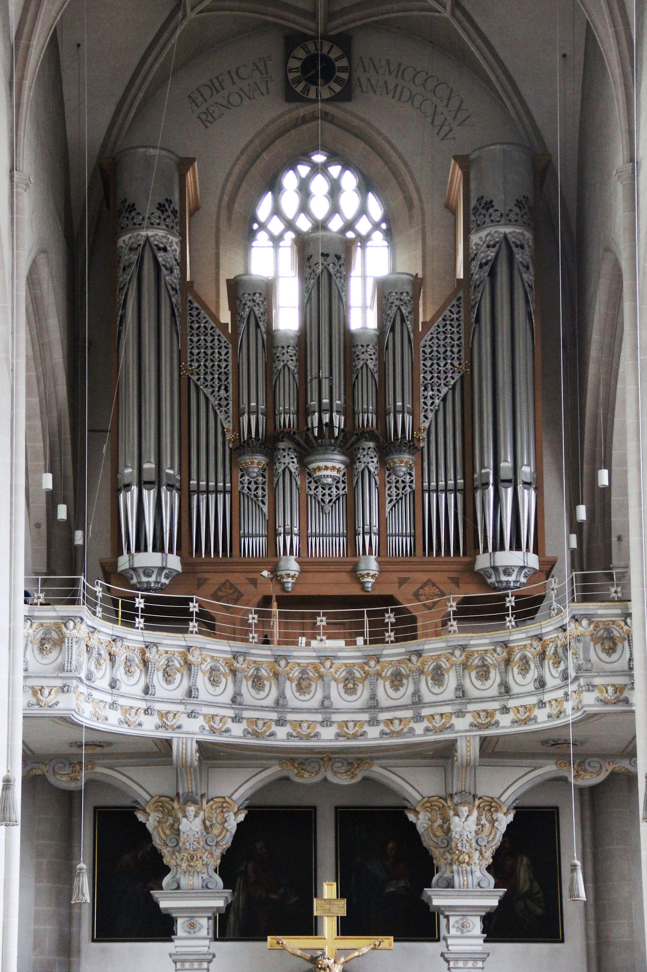 Liebfrauenmünster Native nameMünster Zur Schönen Unserer Lieben FrauLocationIngolstadt, Upper Bavaria, GermanyCoordinates48° 45′ 51.48″ N, 11° 25′ 13.8″ E Established1425 Web page Authority control : Q877491 VIAF: 155232299 LCCN: nr99019630 GND: 4404058-1 SUDOC: 124317421 NLI: 001442259 WorldCat institution QS:P195,Q877491